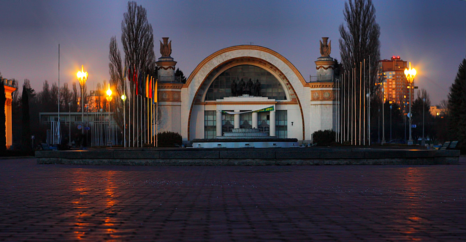 Павільйон машино- та приладобудування № 7, Київ, Глушкова Академіка просп., 1